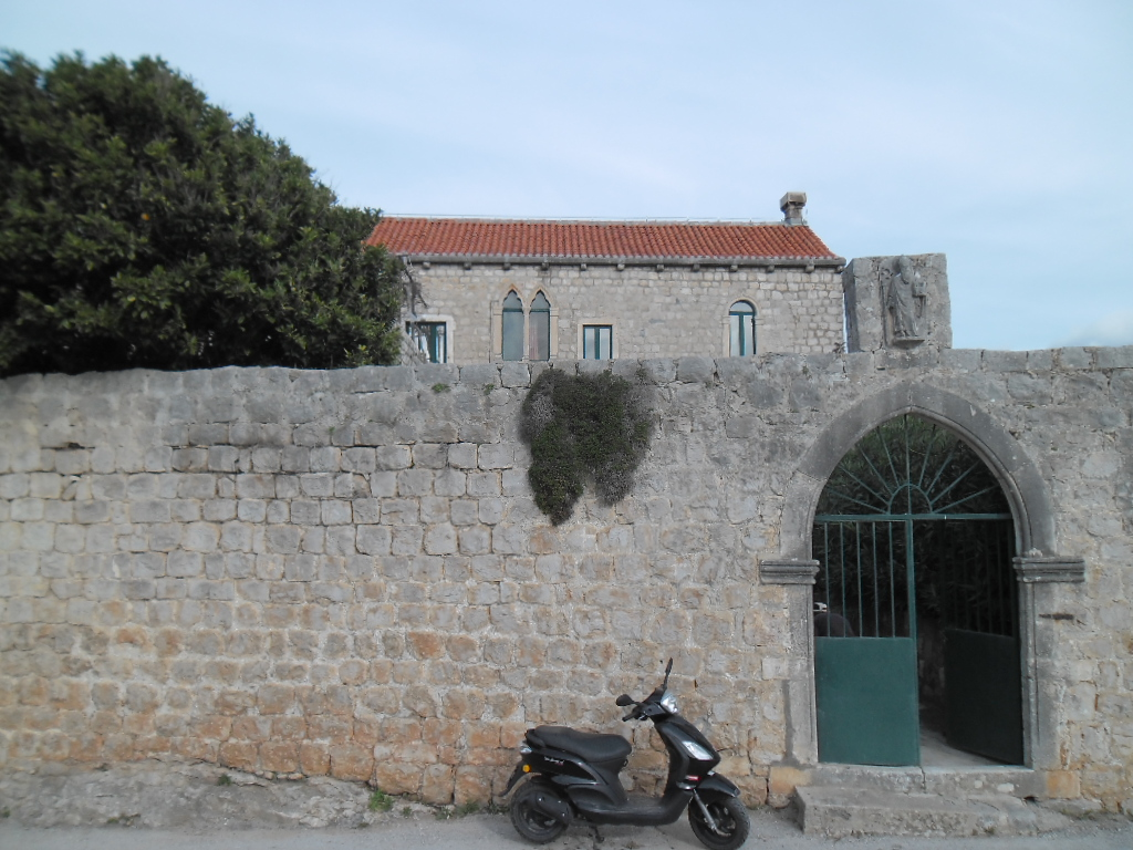 šipanski Knežev dvor